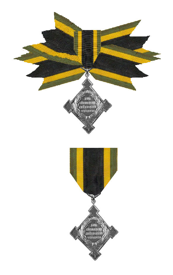 Ehrenzeichen für rühmliche Tätigkeit Grossherzogtum Sachsen 1871